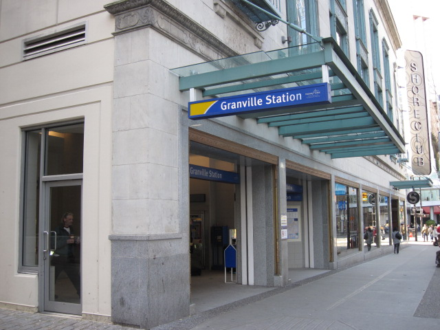 Granville Station, Vancouver, BC, Canada. Made by myself.カナダ ブリティッシュコロンビア州 バンクーバーのグランビル駅。著者によるアップロード。